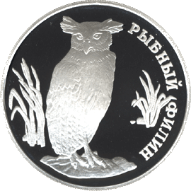 Серия: «Красная книга», Рыбный филин, 1 рубль, реверс.